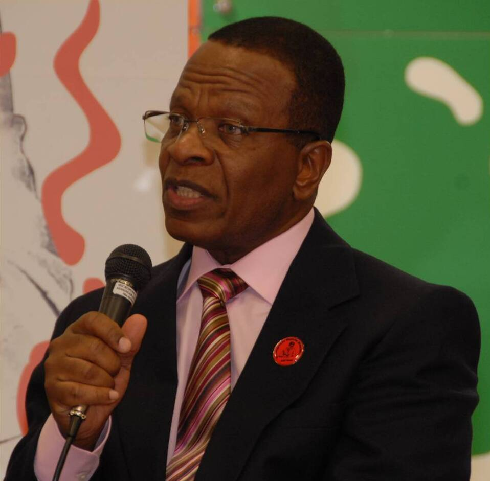 Photographie de Raul Texeira, prise en 2010 lors de la célébration du centenaire de la naissance de Chico Xavier, à Brasília, Brésil.